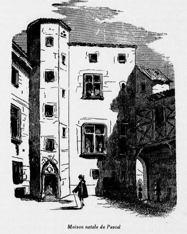 Maison de Blaise-Pascal à Clermont-Ferrand. Illustration issue de l'Auvergne historique et artistique, 1934.